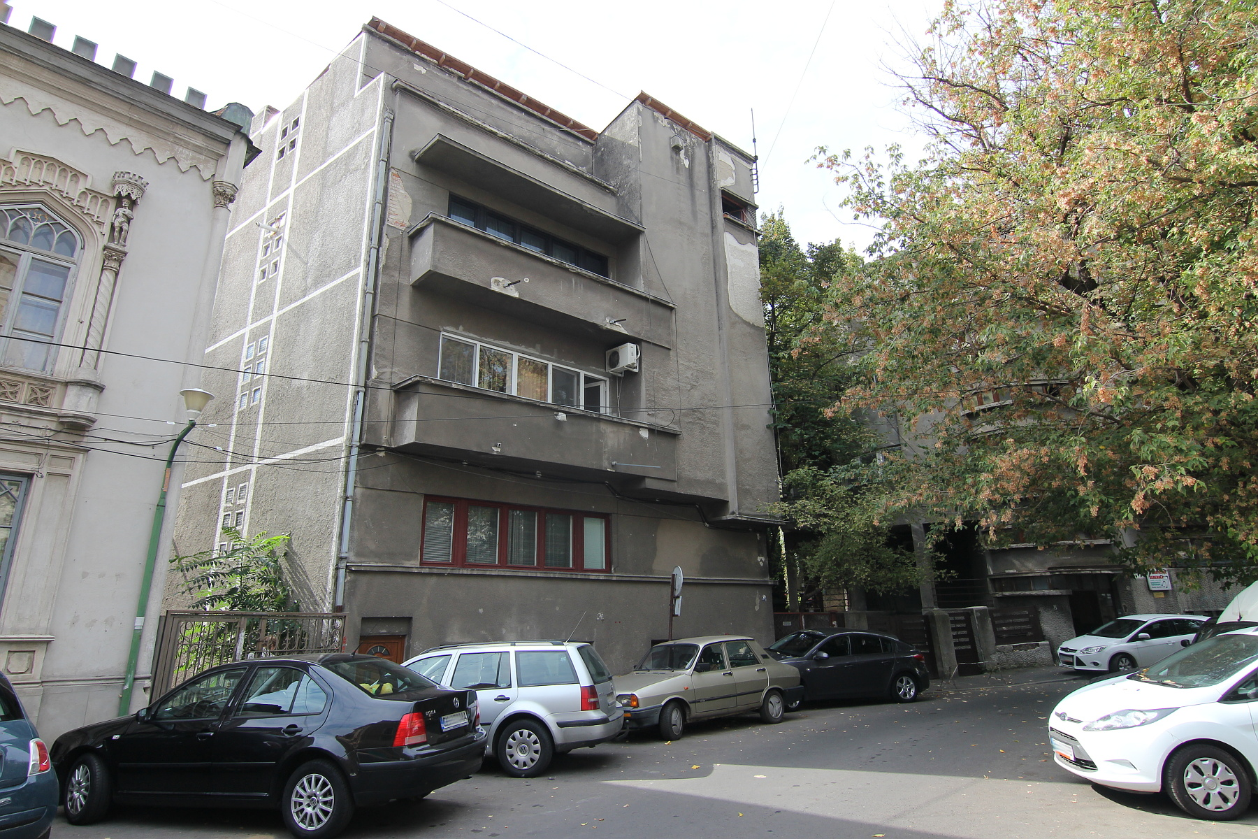 Imobil locuințe pe Stelea Spătarul